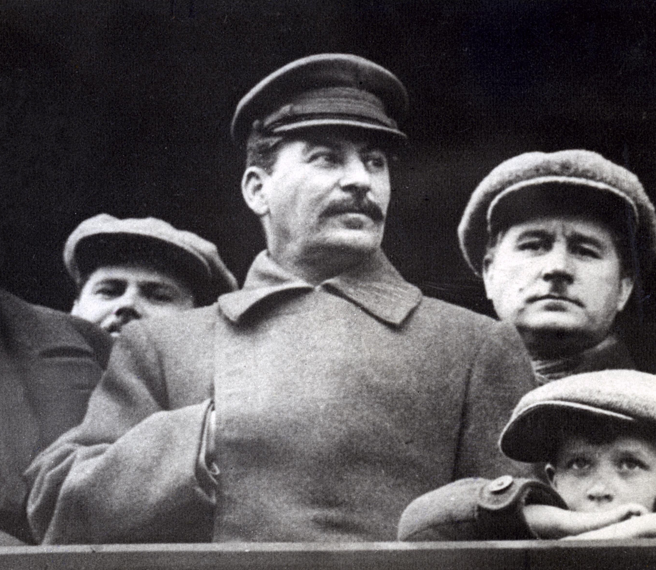 Aanloop naar de Tweede Wereldoorlog. Jozef Stalin omringd door mensen met petten. Rusland, 1937.